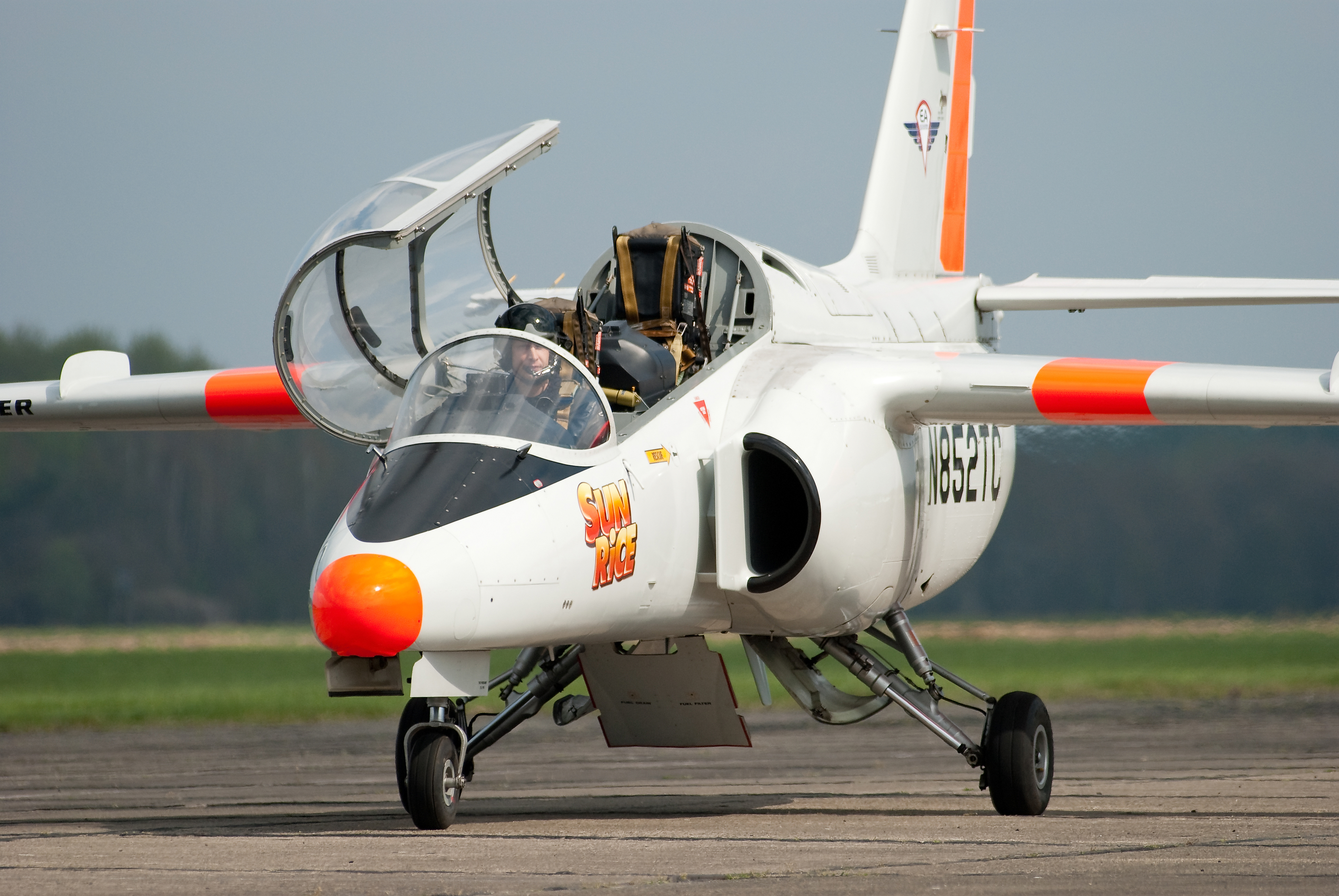 SIAI-Marchetti S-211 at Rechlin-Lärz Airfield